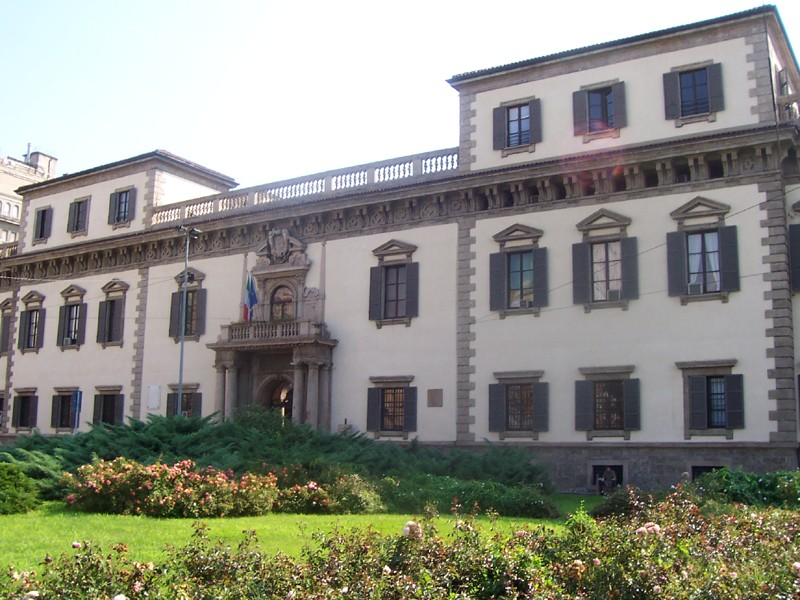 Palazzo del Capitano di Giustizia a Milano.